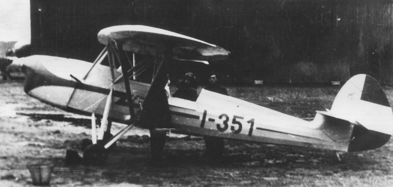 A Levente prototípusa a győri MWG gyár repülőterén